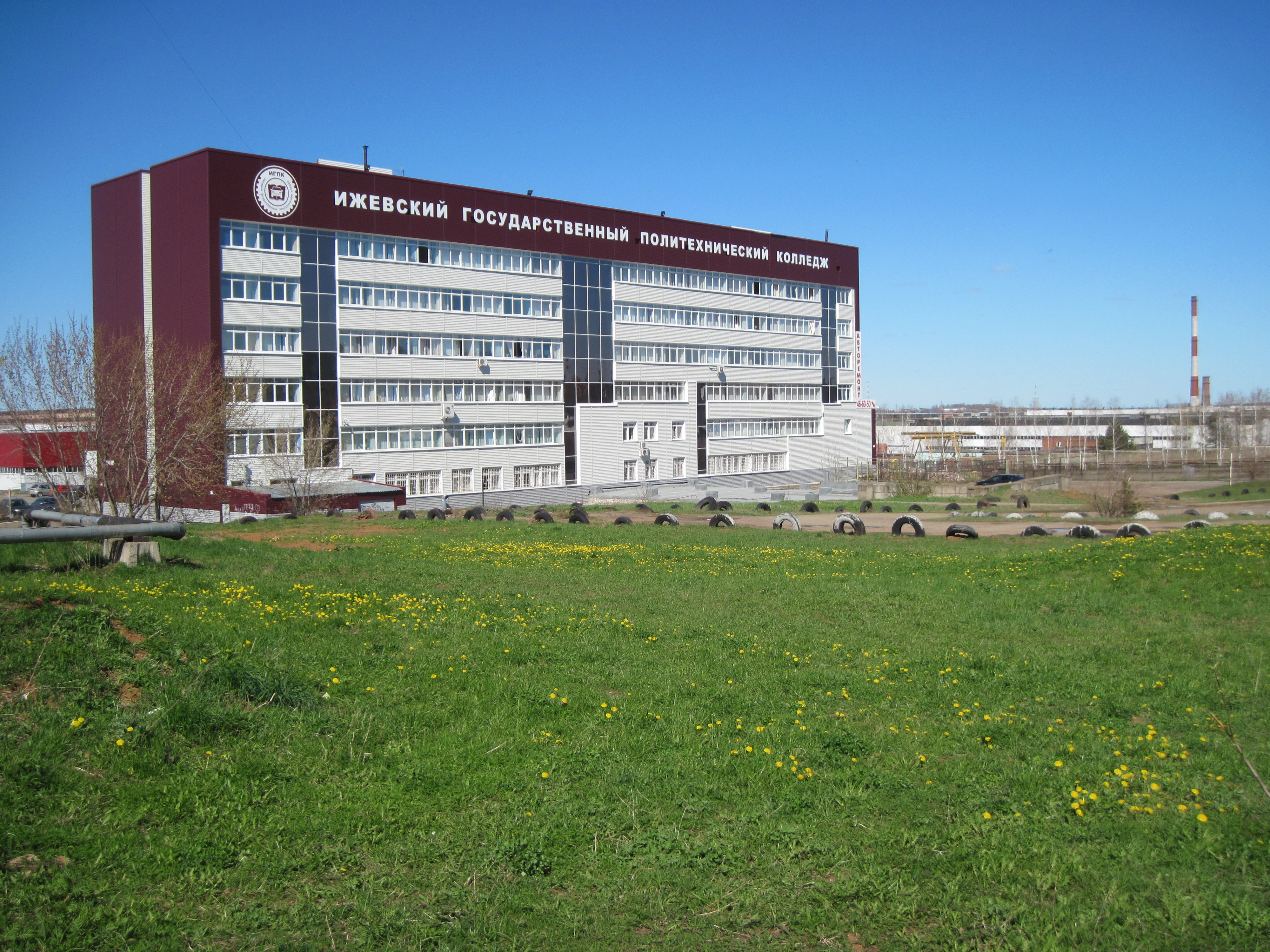 улица Салютовская,33